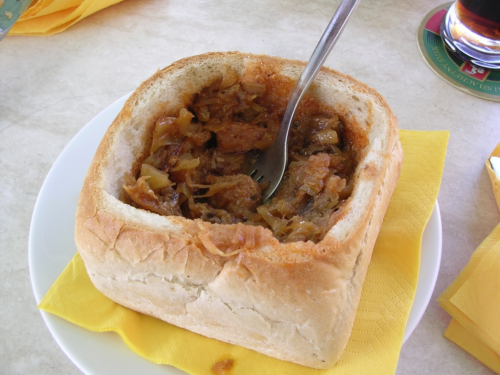 Bigos served on Rynek Główny in Kraków.